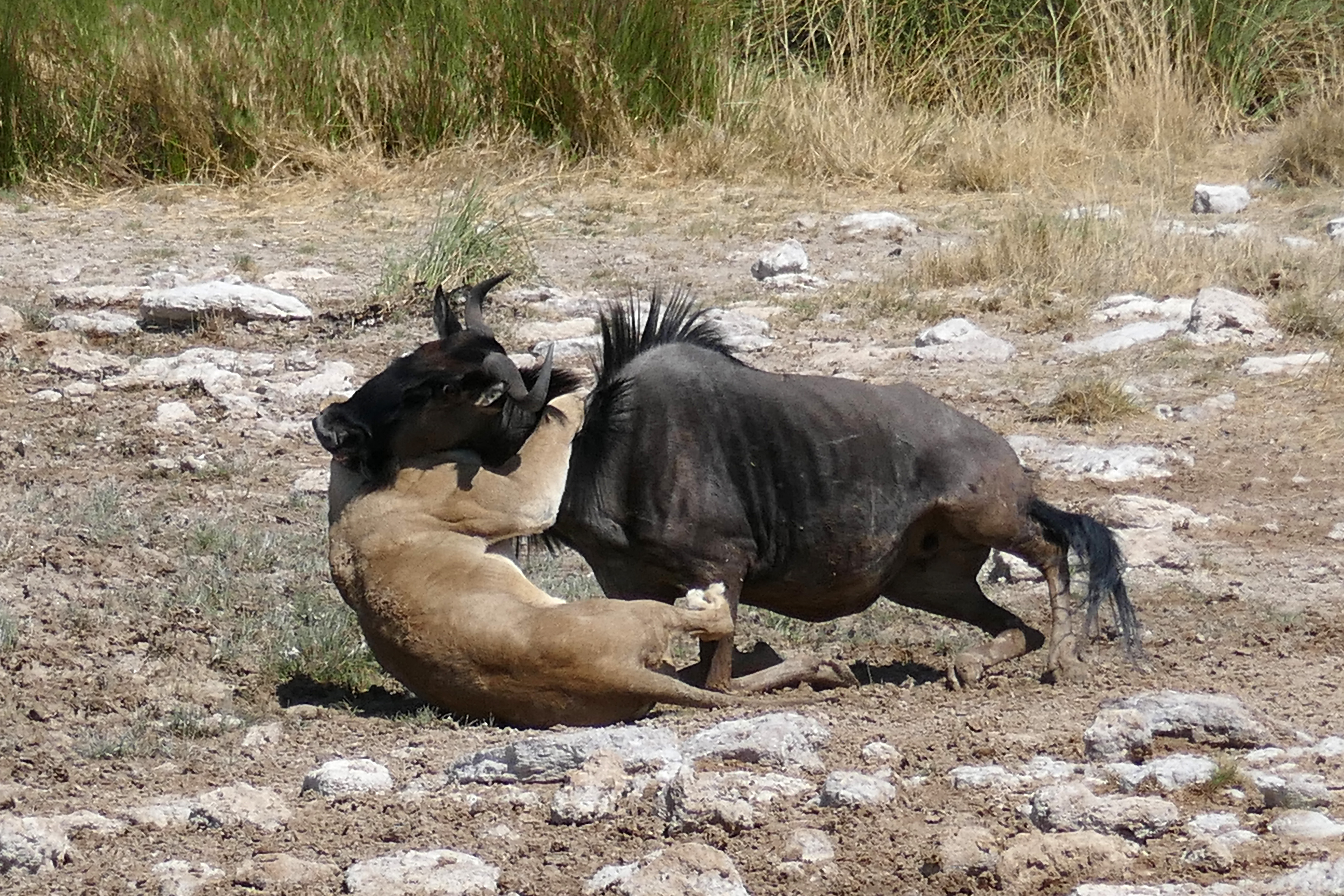 Lionne dévorant un gnou dans le parc national d'Etosha (Namibie).